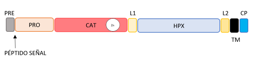 Figura 1: En esta imagen se encuentra representada la estructura de dicha proteína. Está compuesta por un predominio (Pre), un prodomionio (Pro) y el sitio catalítico (Cat). Se puede observar el péptido señal, que se encuentra localizado en el predominio, así como el dominio similiar a la hemopexina (Hpx).